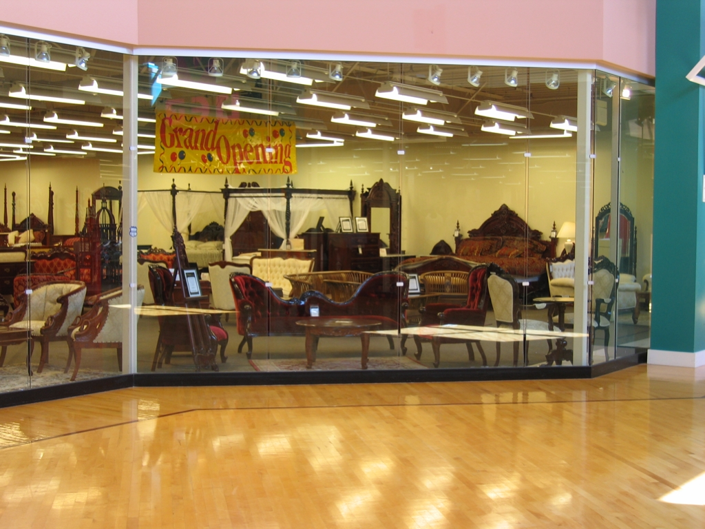 Supermall Furniture